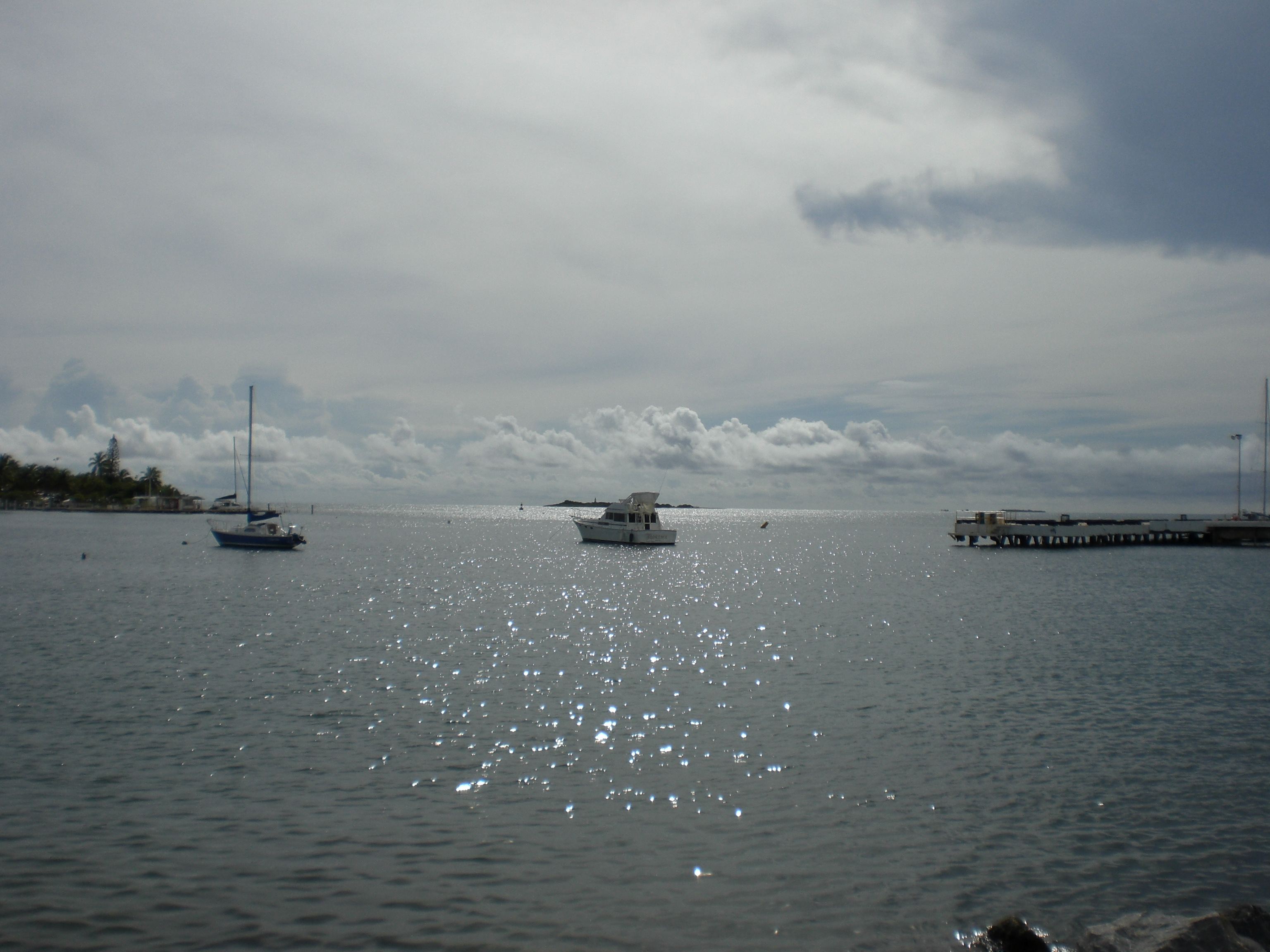 Bahia de Ponce